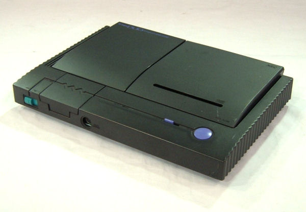 PCエンジンDuo 撮影日 2004/01/01 撮影場所 日本 撮影者 風霧 category:ゲーム機画像 Category:PCエンジン